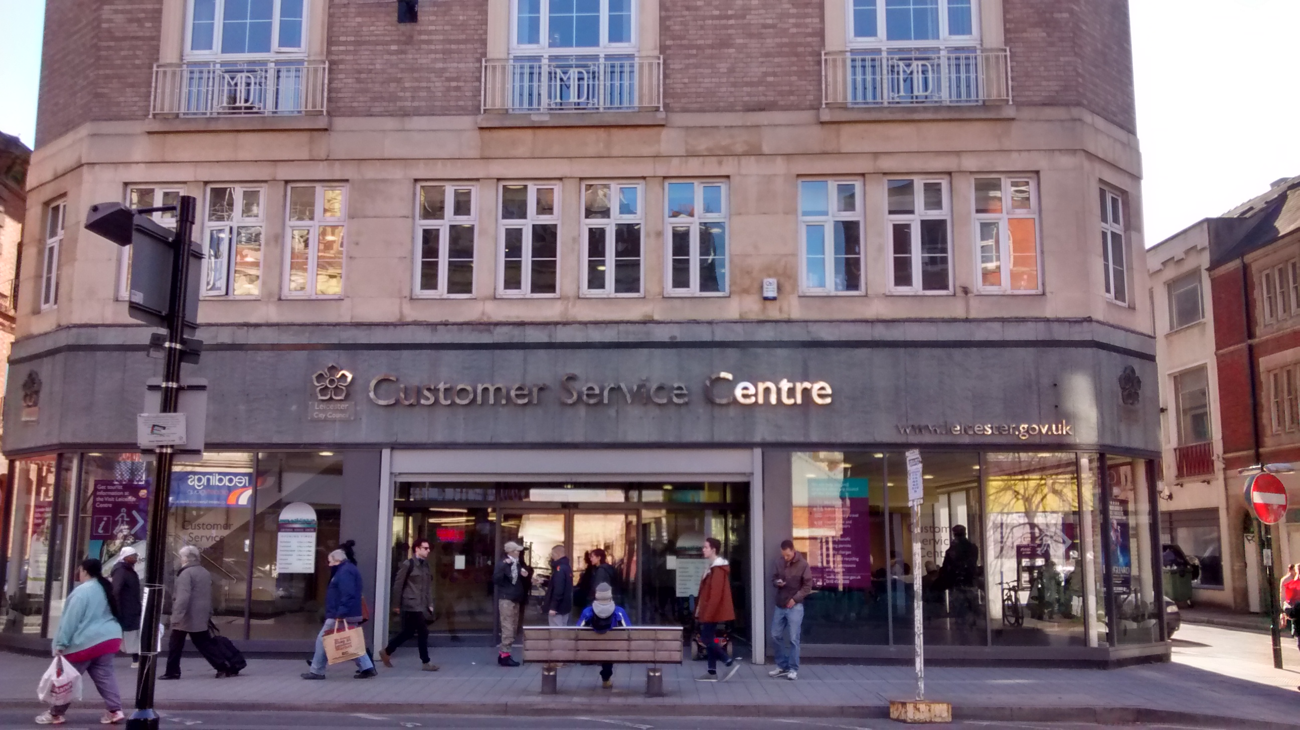 Urząd Misata ( City Council Leicester)